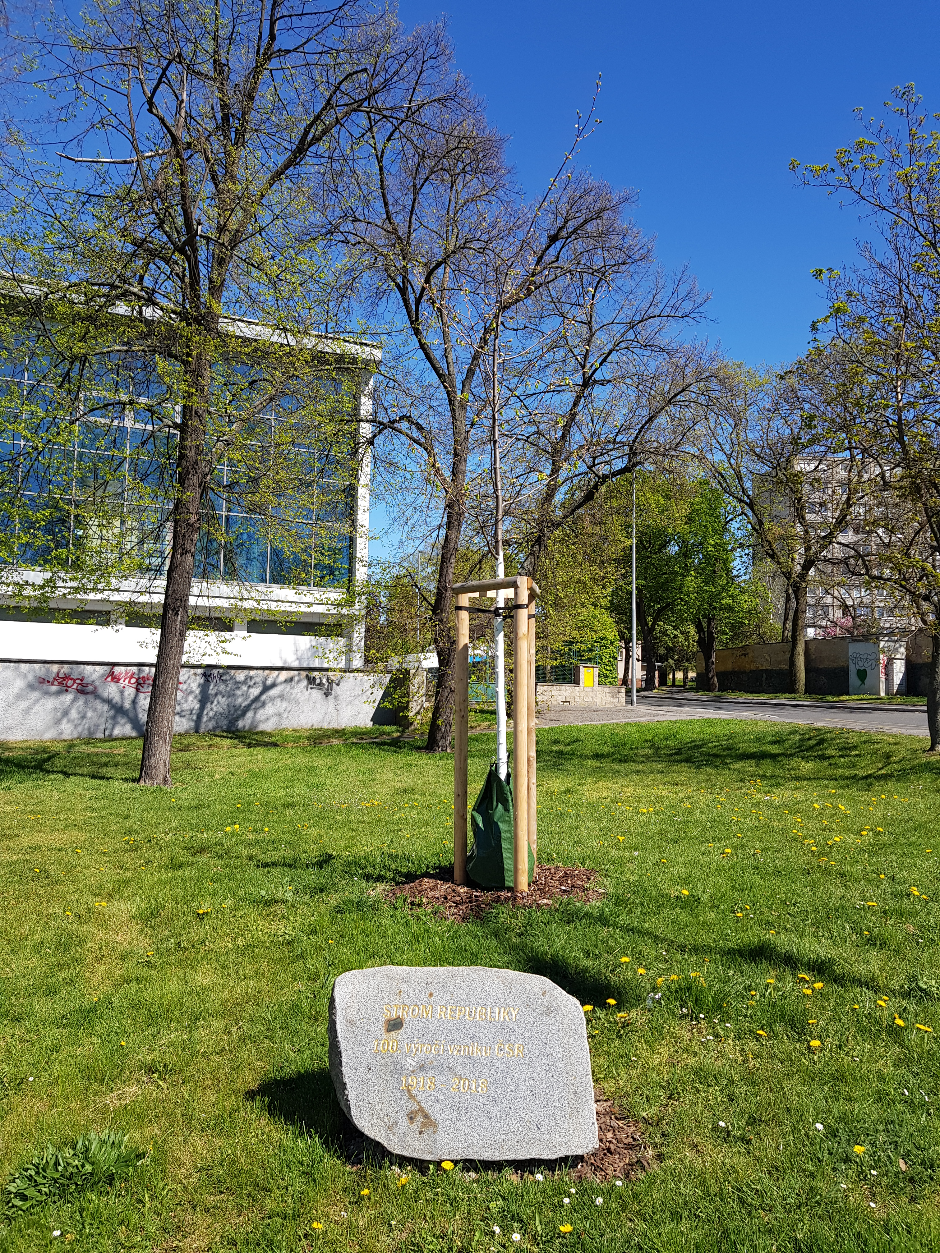 Strom Republiky (lípa) na náměstí Ve Starém Hloubětíně, Praha 14 - Hloubětín